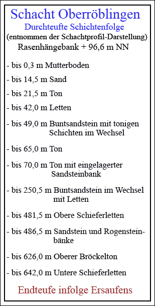 Die vom Schacht Oberröblingen bis zum Sole-Einbruch durchteuften Gesteinsschichten